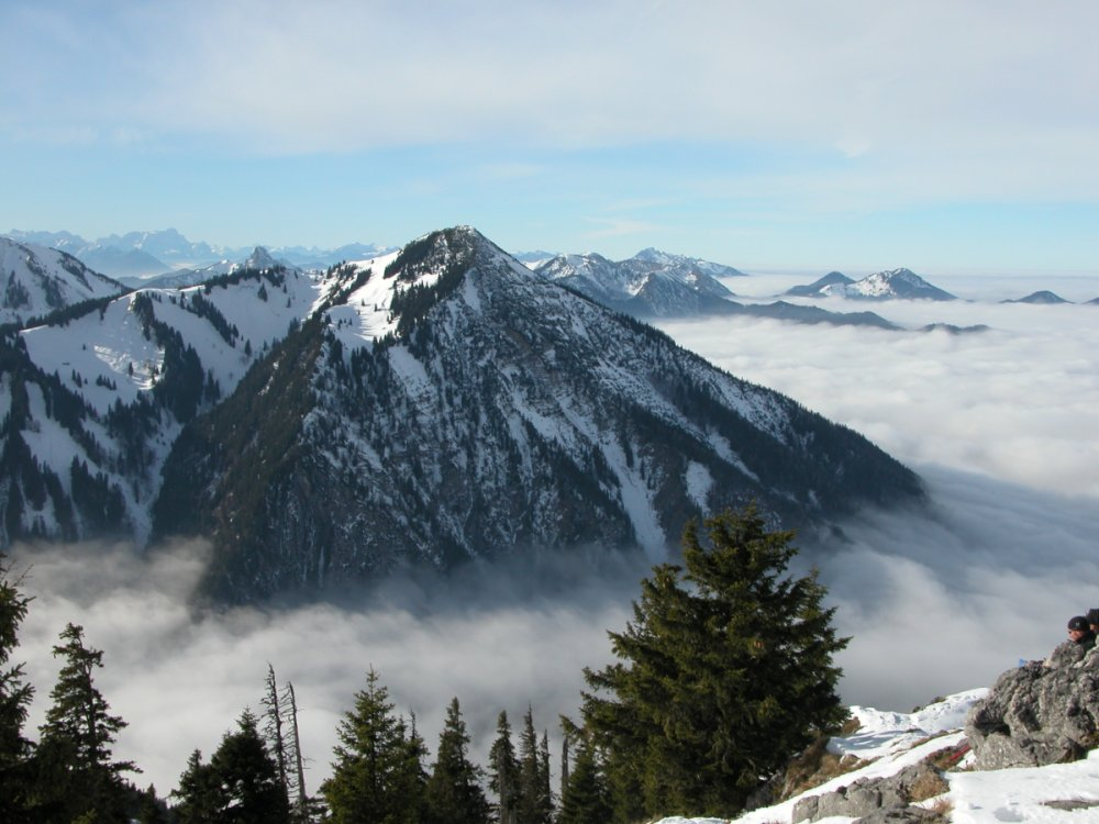 Blick auf den Wallberg